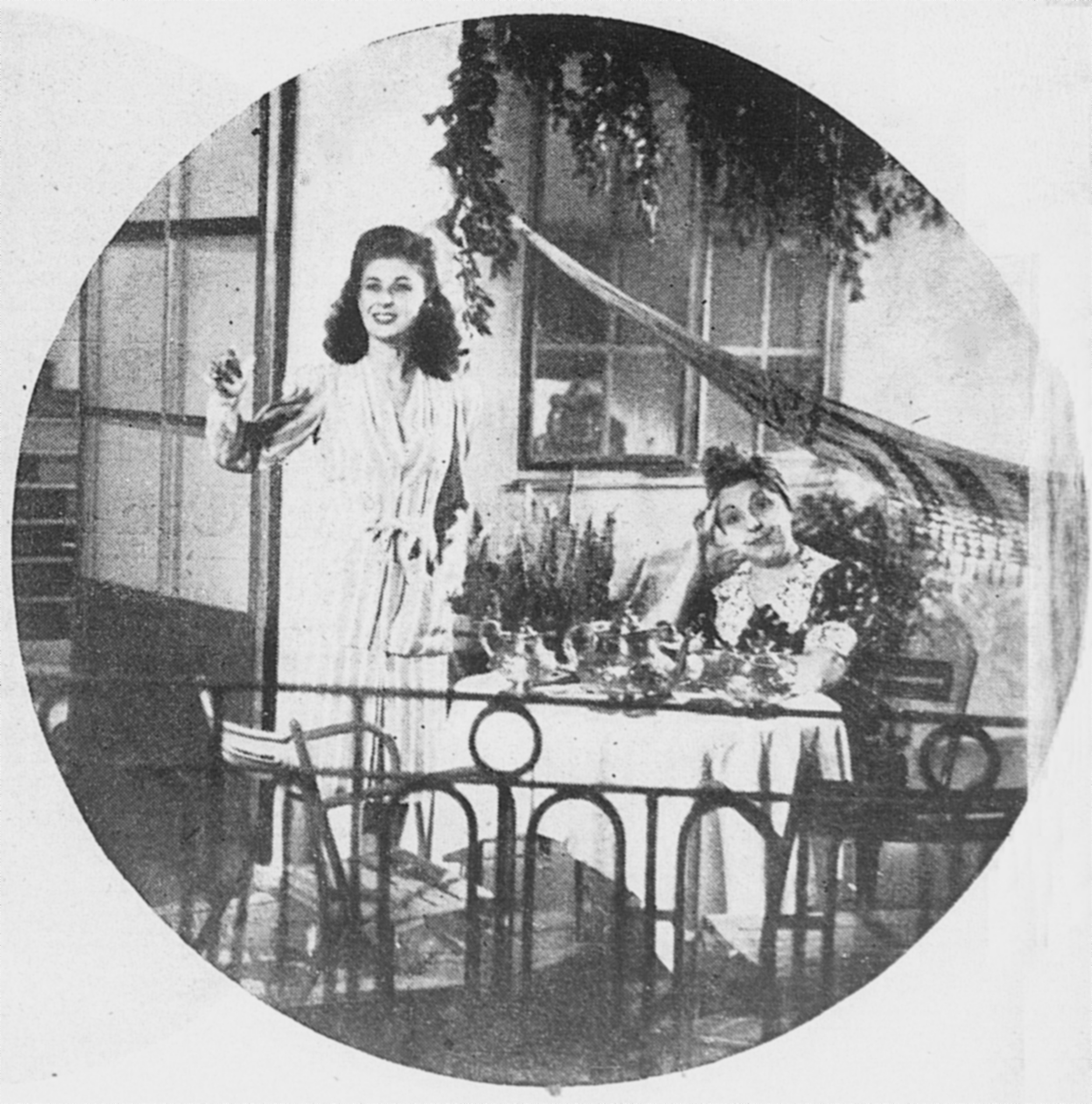 Cena do filme brasileiro de 1943, Caminho do Céu, com a protagonista Rosina Pagã e a atriz Sarah Nobre.